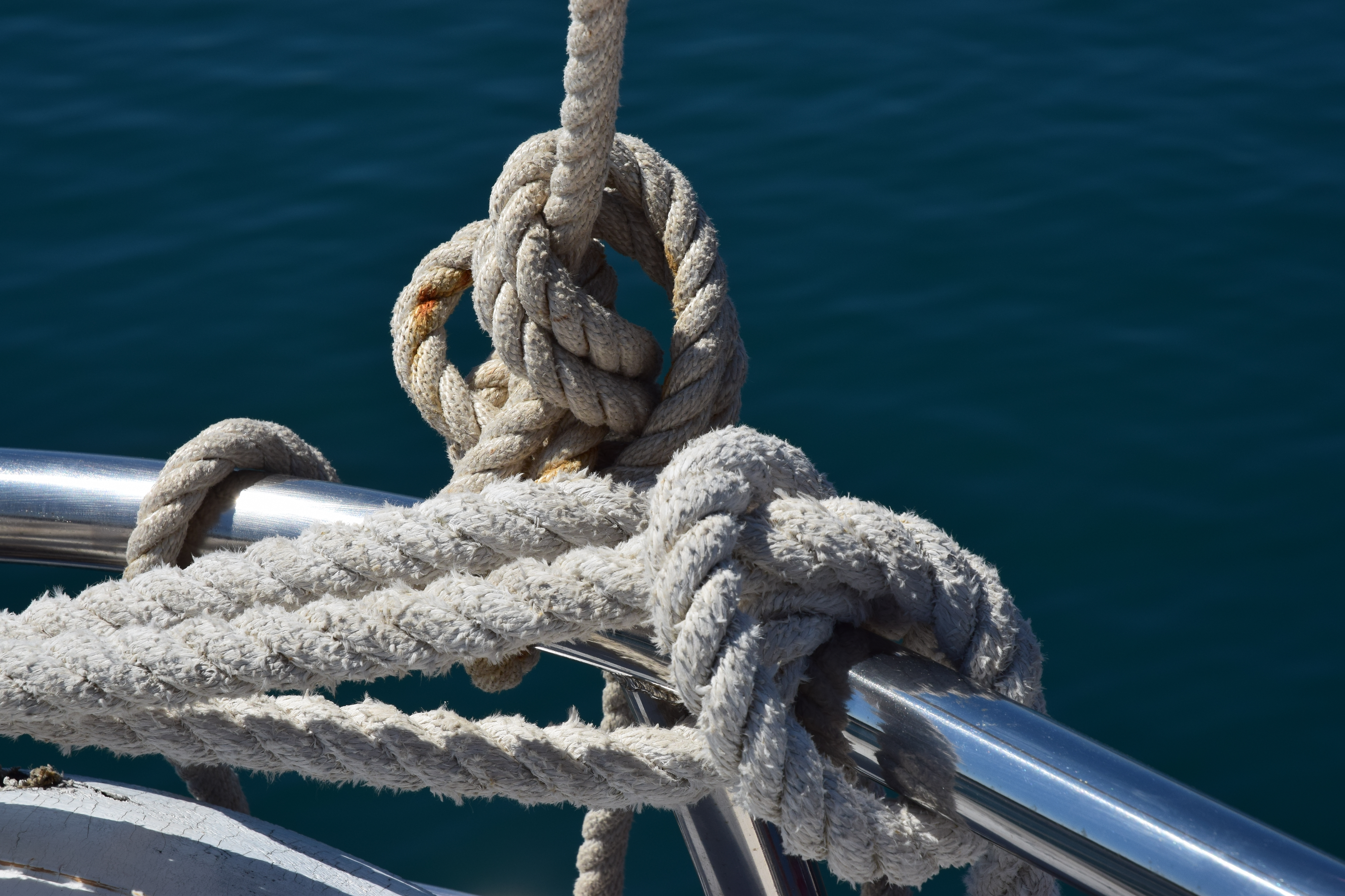 Detail eines Schiffes im Hafen von Split